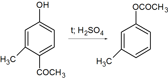 Ретрореакция Фриса на примере пара-оксикетона с метильной группой в орто-положении к ацильной.